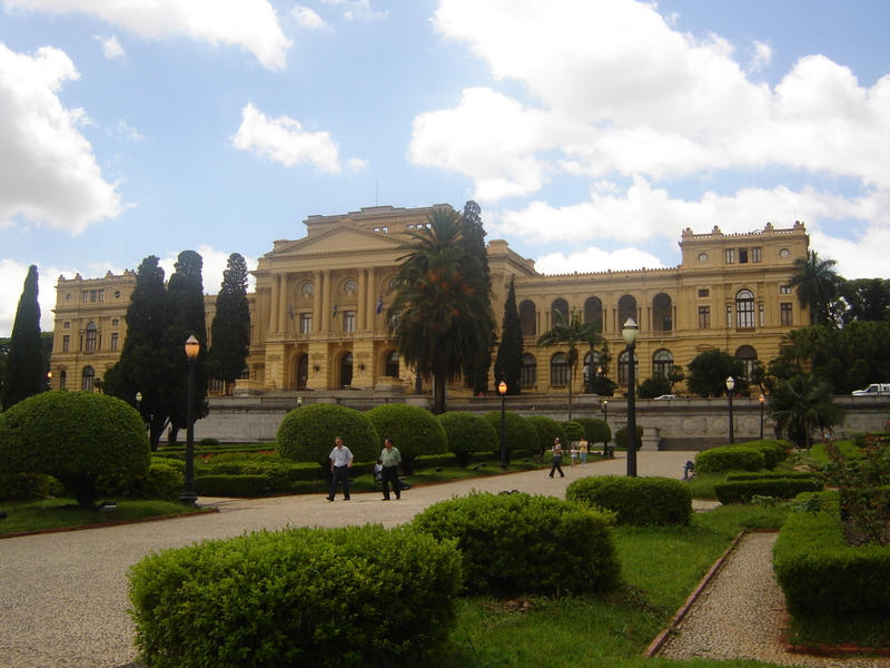 Museu do Ipíranga